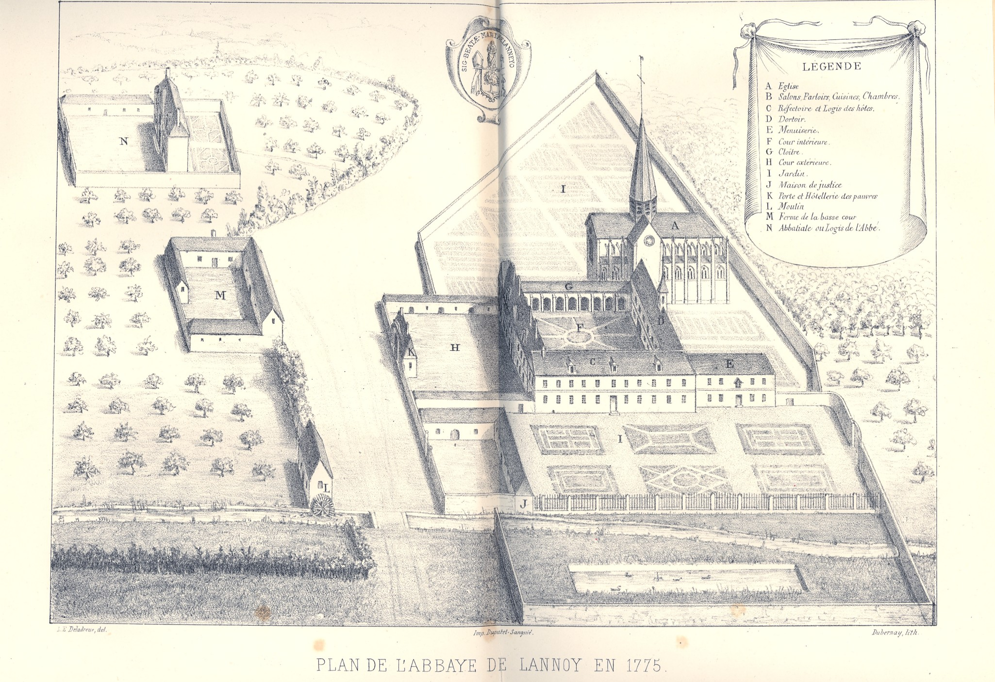 Plan de l'abbaye de Lannoy en 1775, Roy-Boissy, Oise, France.